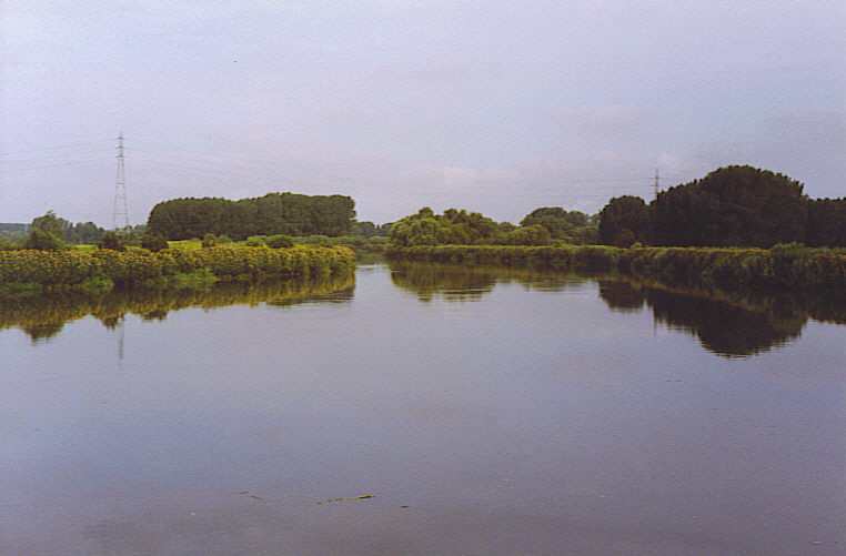 self made